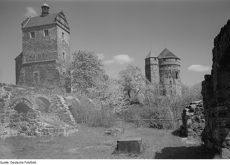 Original image description from the Deutsche Fotothek Stolpen. Burg Stolpen